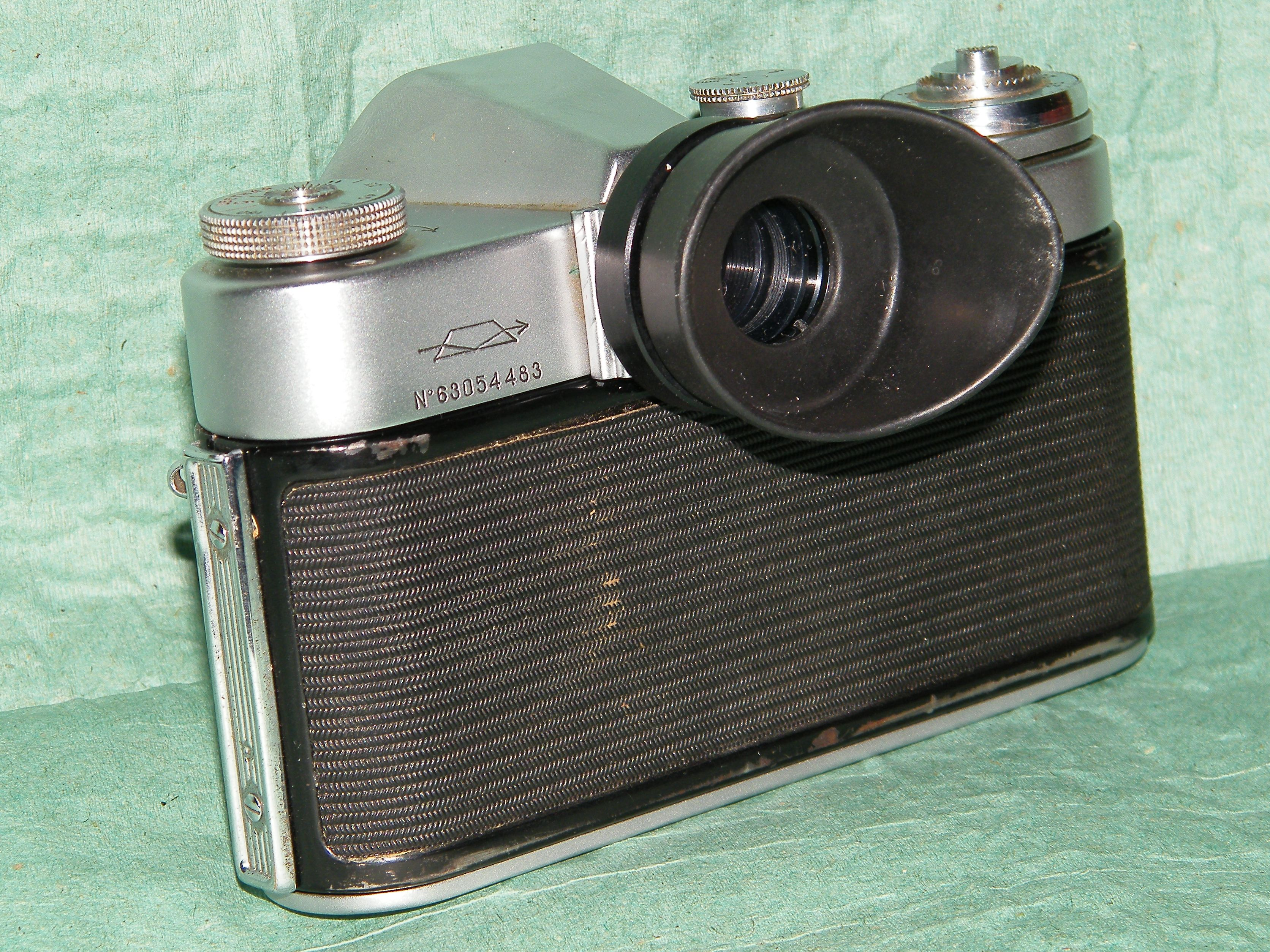 Наглазник диоптрический НД-2 на фотоаппарате ЗЕНИТ-3М